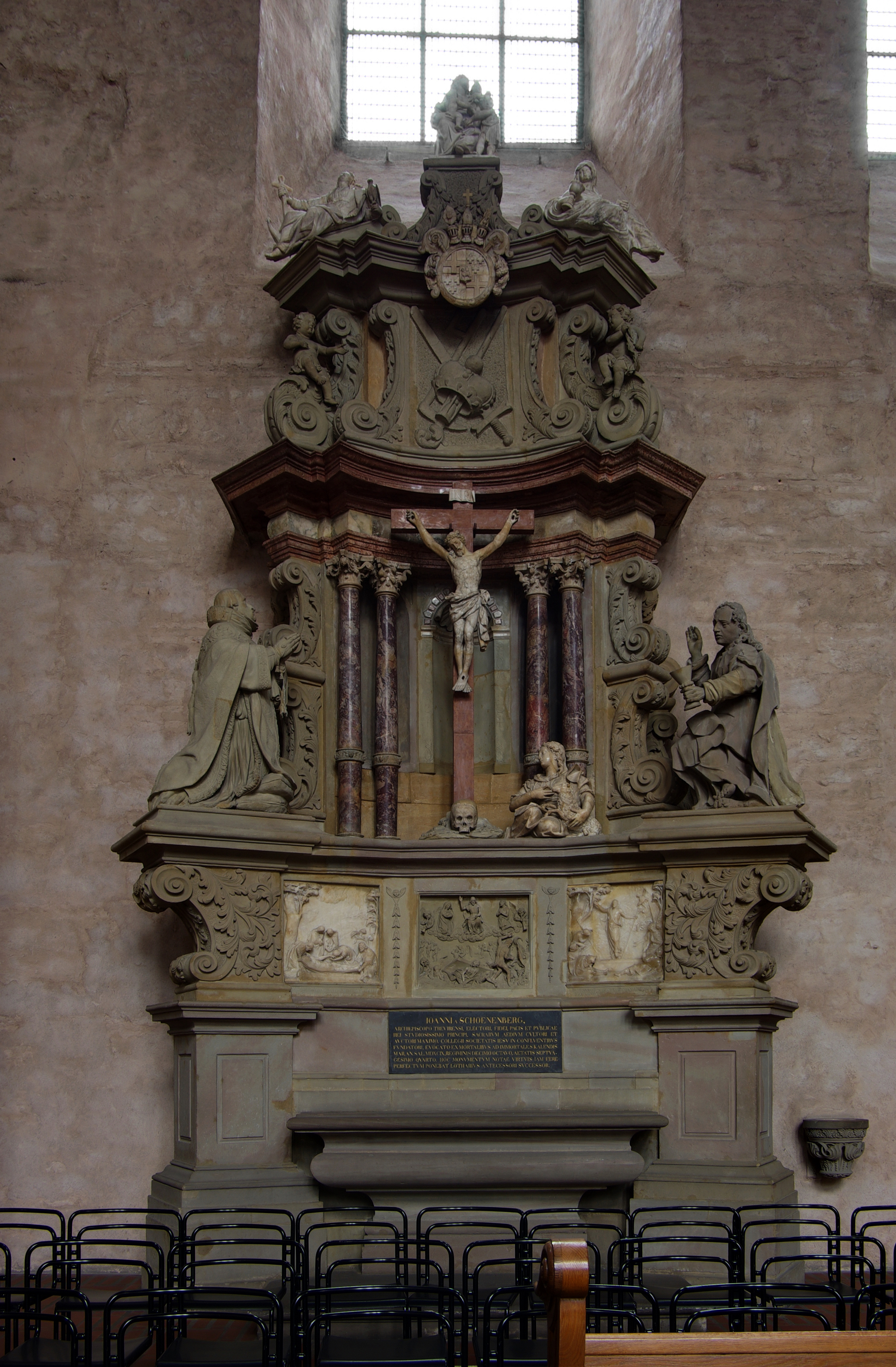 Trierer Dom, linkes Seitenschiff, Johannes-Evangelista-Altar, Grabdenkmal Erzbischof Johann von Schönenburg